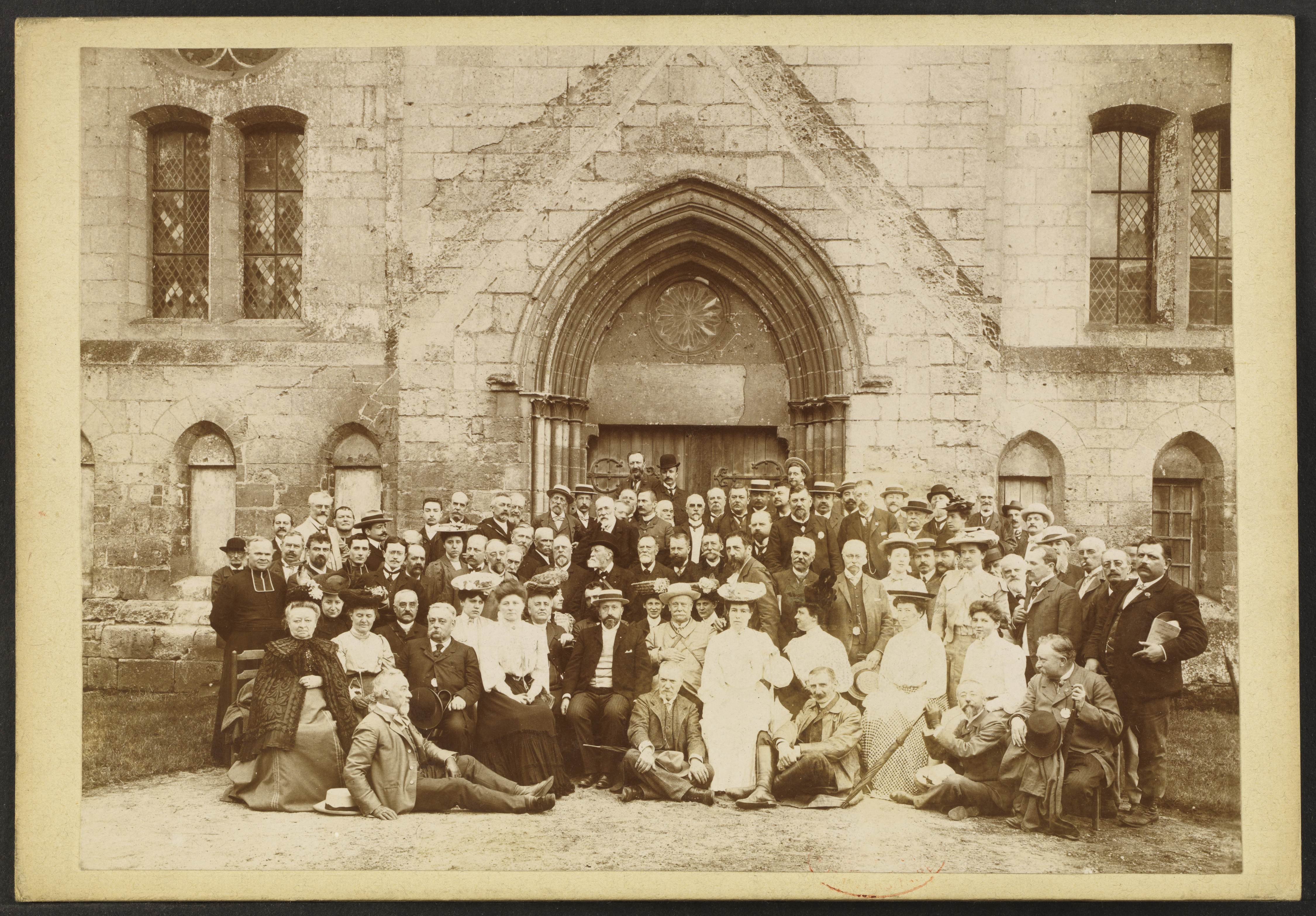 Abbaye Notre-Dame d'Ourscamp; L'infirmerie des moines